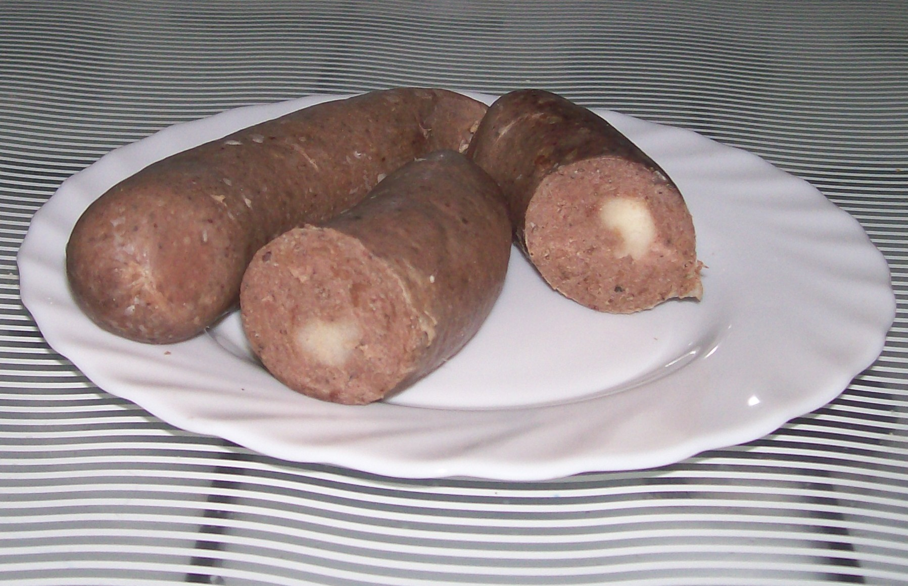 żymloki (bułczanka)